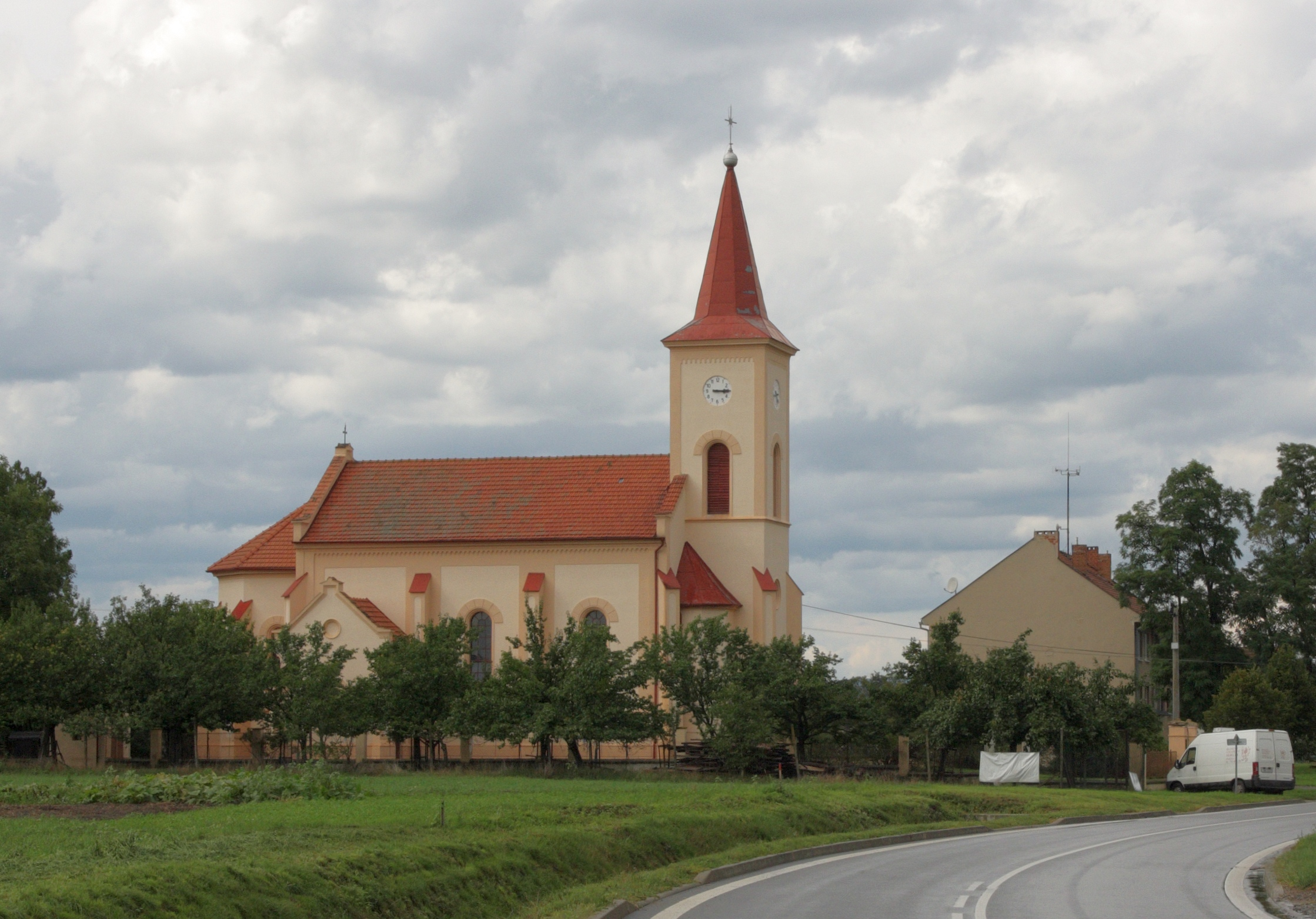 Odrovice - Kostel Panny Marie Pomocnice křesťanů.